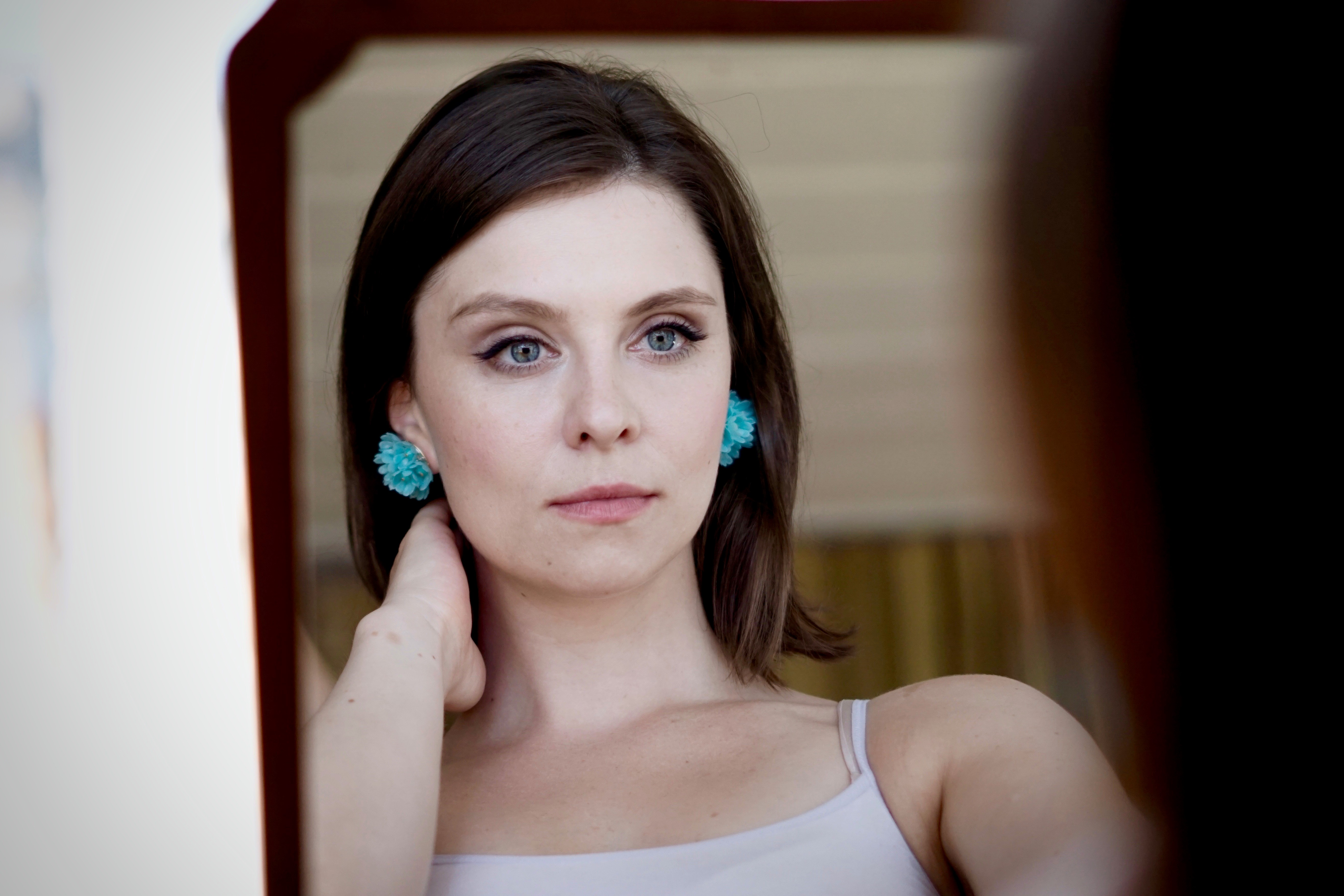 Schauspielerin Natalia Rudziewicz im Juni 2018